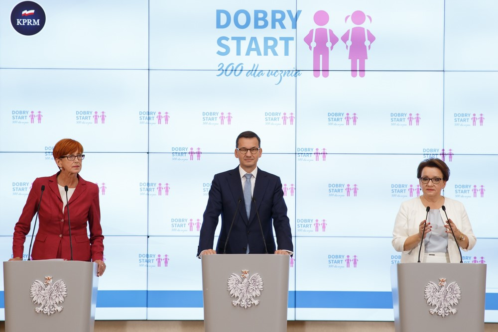 Konferencja Dobry Start 300 zł dla uczniów w Polsce na początku roku szkolnego. Wypowiedź dla mediów premiera Mateusza Morawieckiego, minister rodziny, pracy i polityki społecznej Elżbiety Rafalskiej oraz minister edukacji narodowej Anny Zalewskiej.